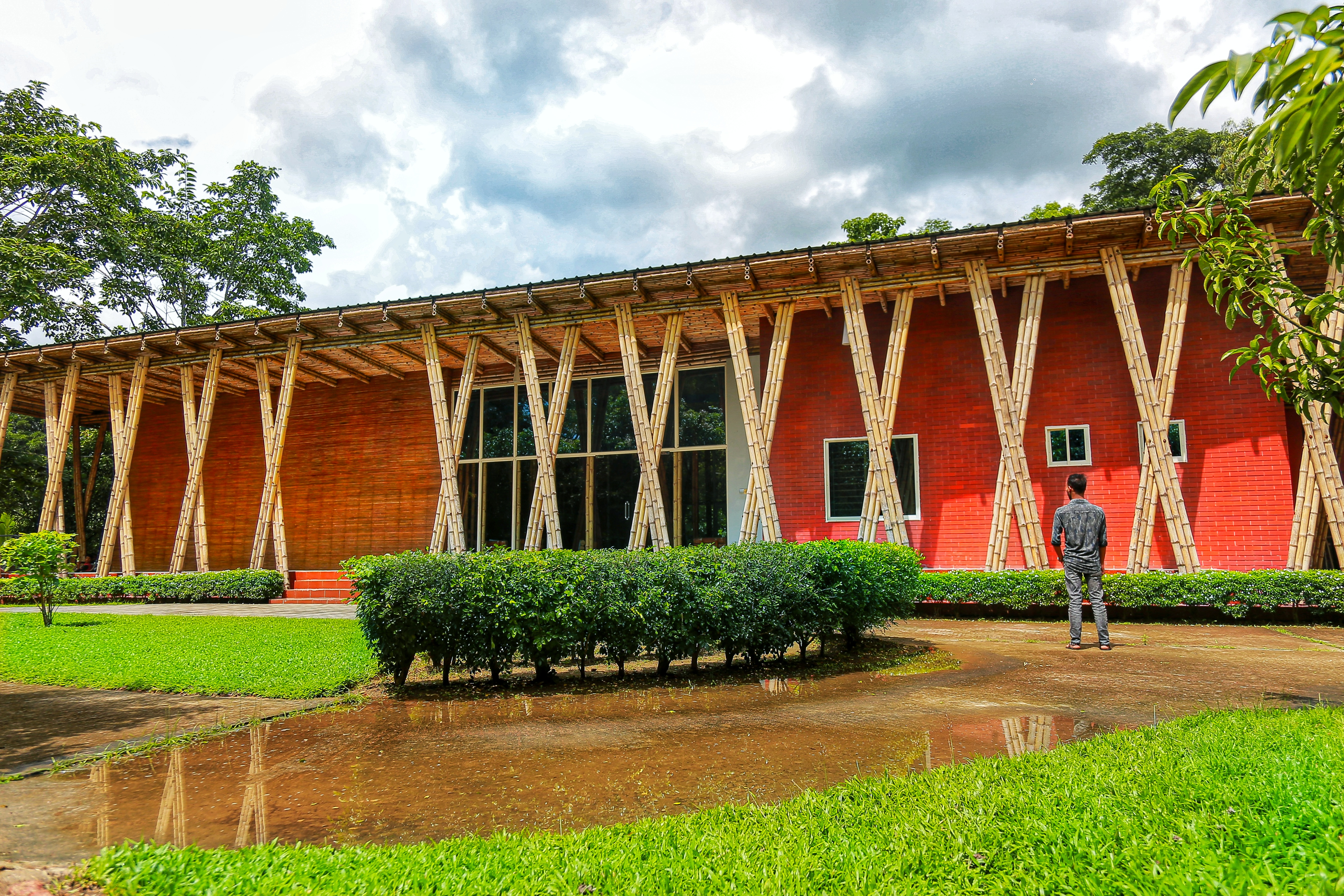 শমসের গাজীর কেল্লা